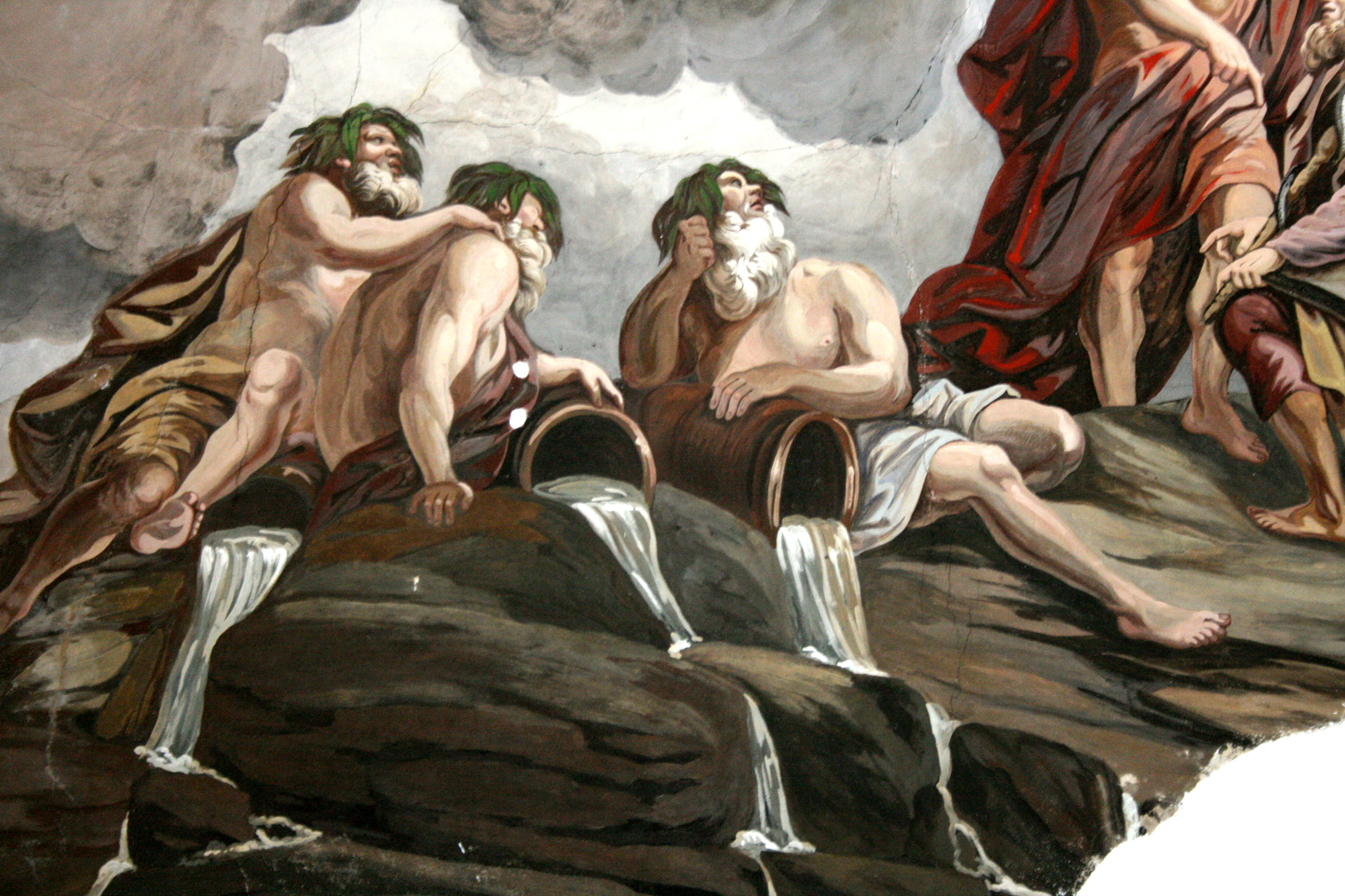 Maison de jeux du Waux-Hall (1769-1779), Spa, (Belgique), oeuvre de l'architecte Jacques-Barthélémy Renoz, du stuccateur Antoine-Pierre Franck et du peintre Henri Deprez. Plafond peint de la salle de bal. Etat en 2009